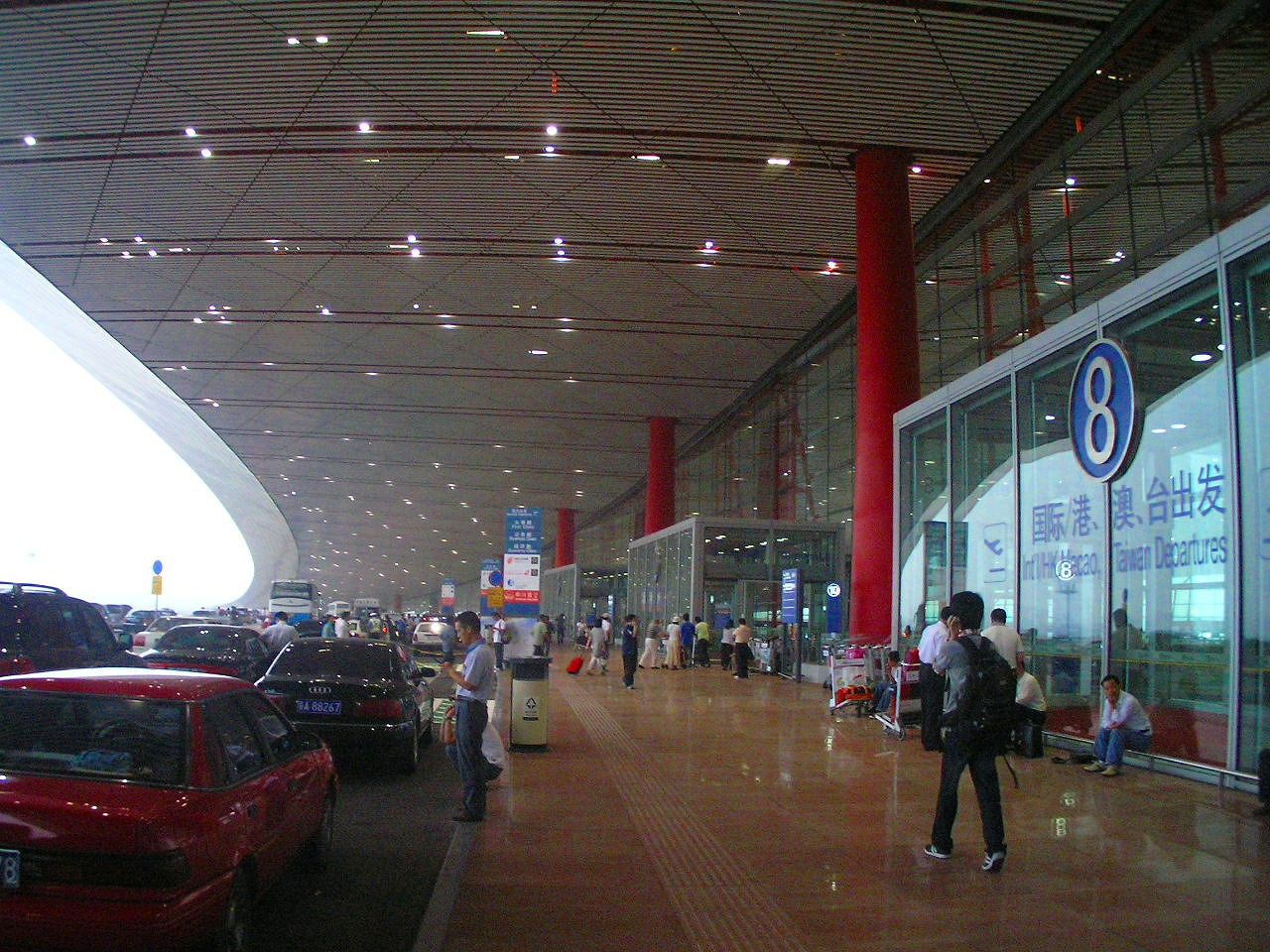 北京首都国际机场（ICAO：ZBAA，IATA：PEK），简称首都机场，为中国北京市的主要的国际机场，并且是目前中国最繁忙的民用机场，同时也是中国国际航空公司的基地机场。 2004年，北京首都国际机场取代成田國際機場成为亚洲飞机起降最为繁忙的机场。按客运量算，2004年，首都机场是亚洲四大机场（位列羽田、曼谷、香港之后）之一以及全球第二十大机场。2006年，北京首都国际机场已成为亚洲第二大机场（仅次于羽田机场），全球排名第9位。